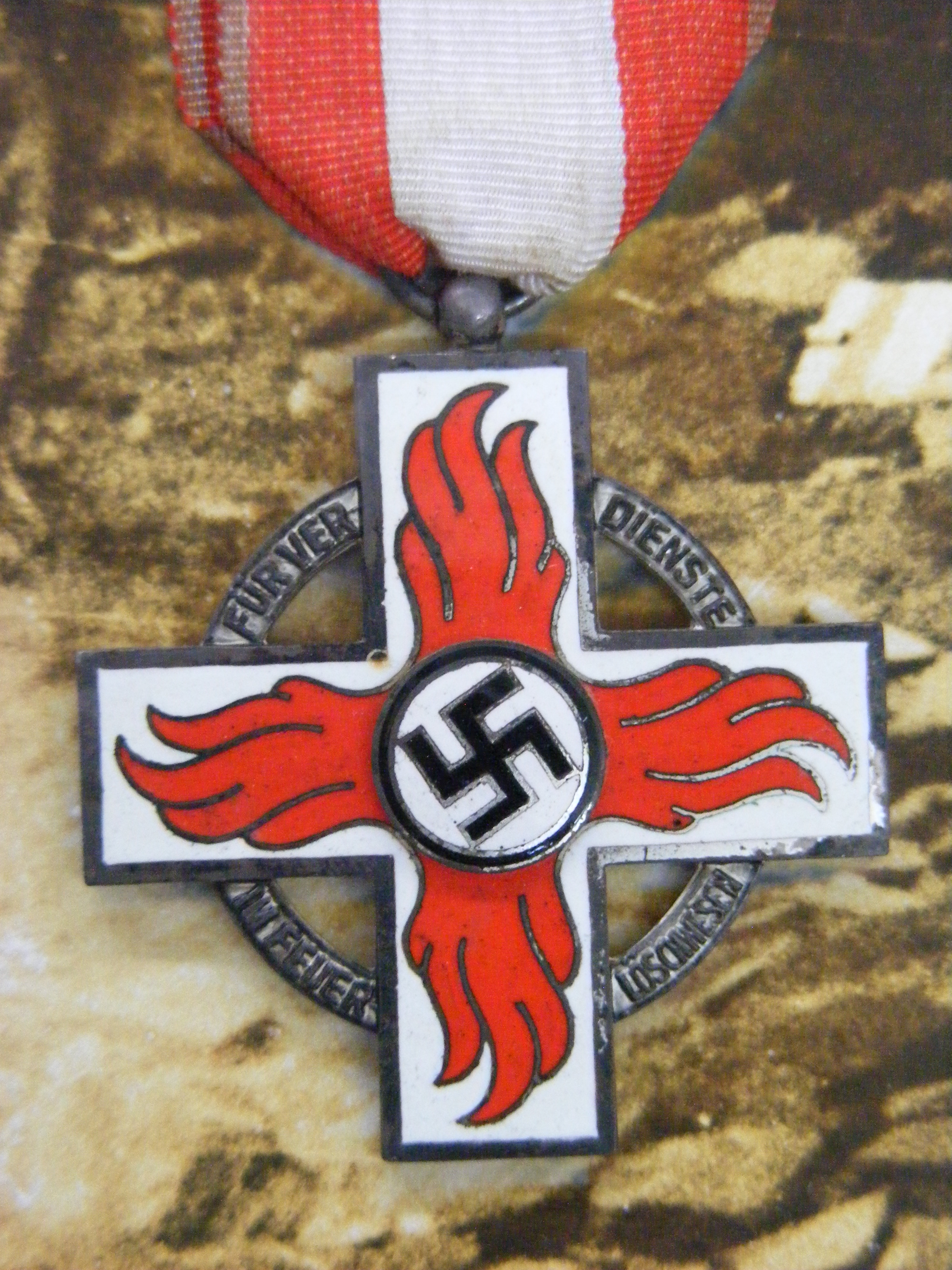 Fulda - Deutsches Feuerwehrmuseum - Reichsfeuerwehrehrenzeichen 2. Klasse inkl. Verleihungsurkunde (Zeit des Nationalsozialismus). Exponat im Deutschen Feuerwehrmuseum Fulda.